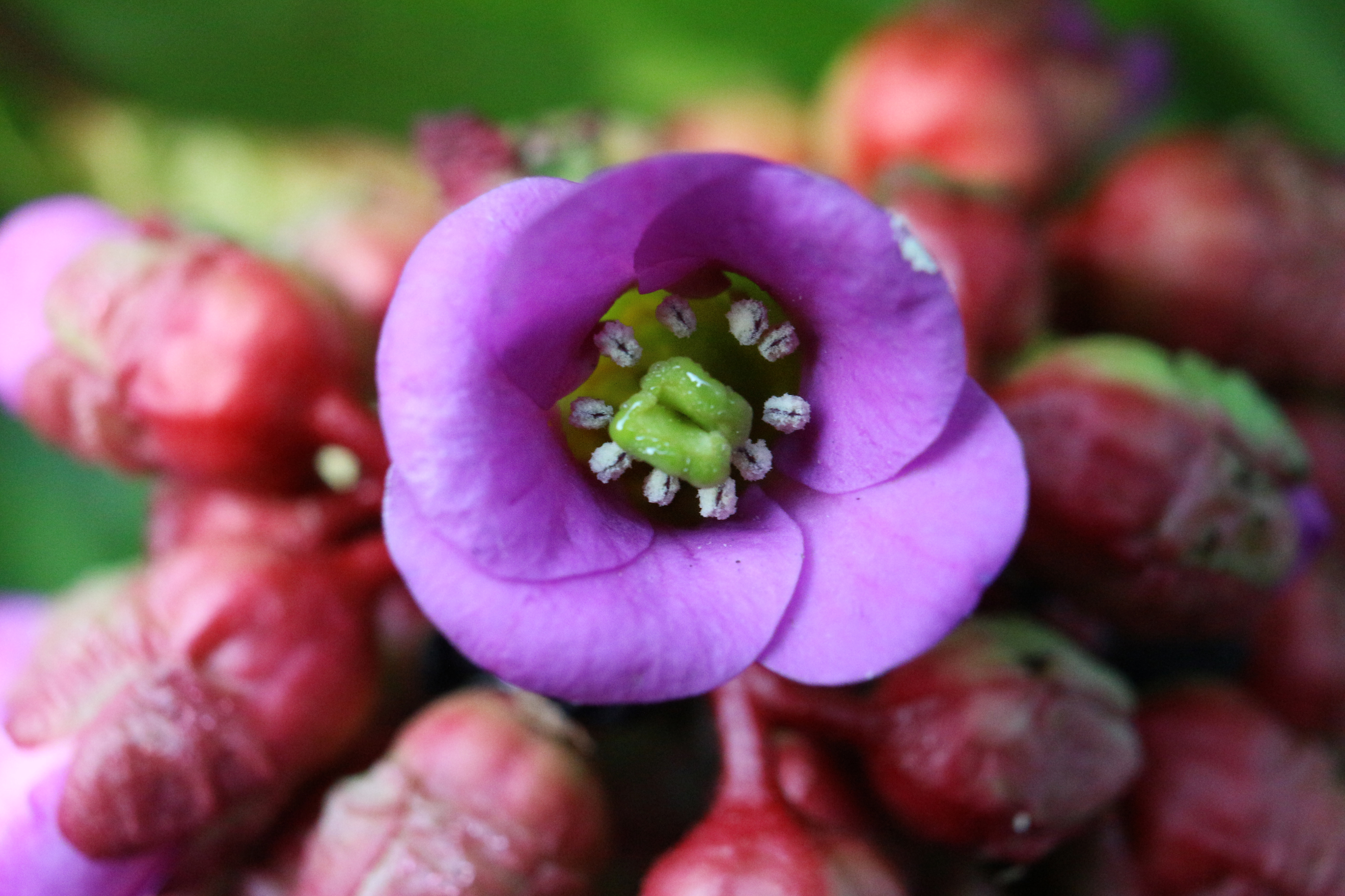 Bergenia crassifolia var. cordifolia syn. B. cordifolia